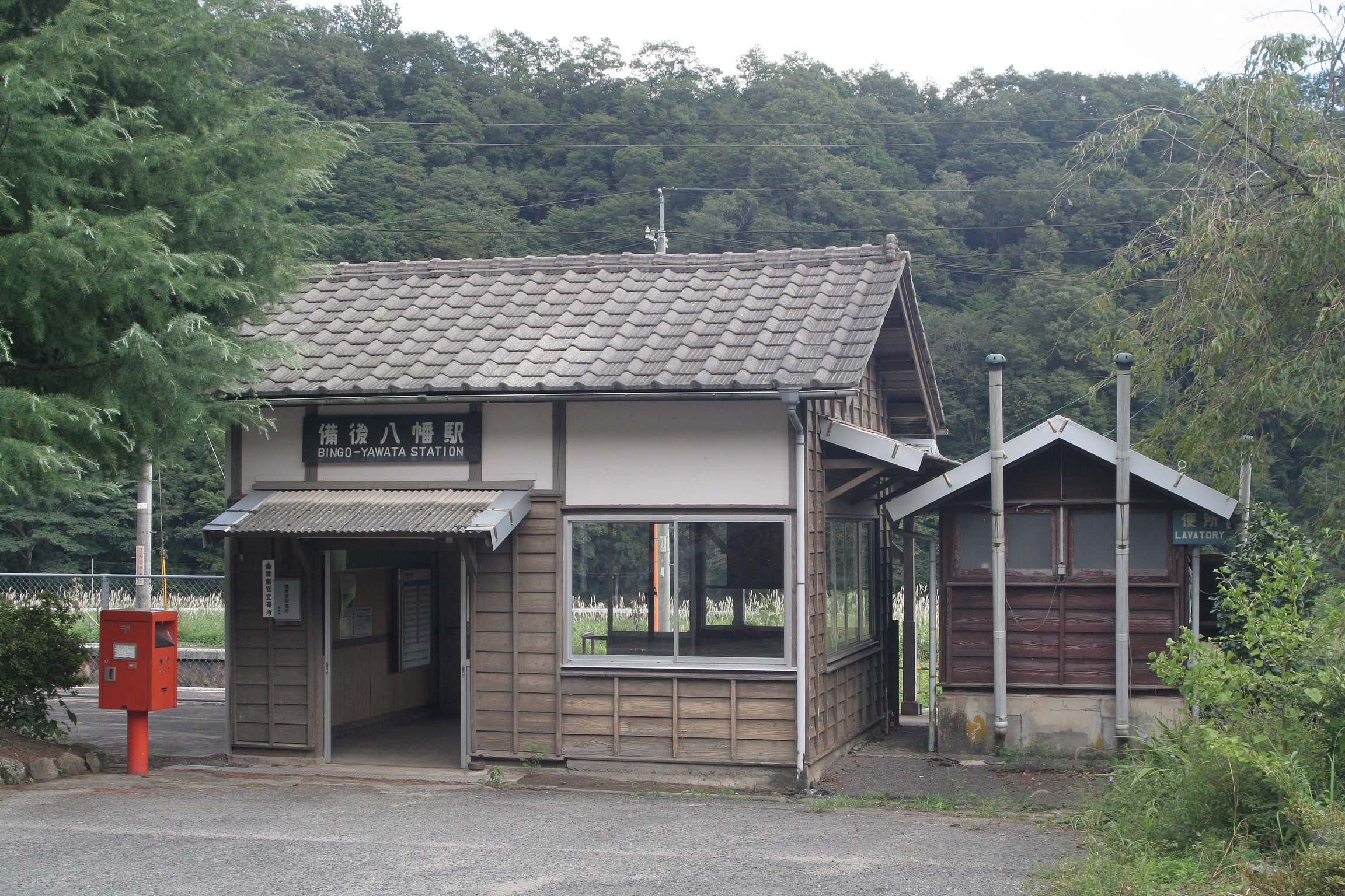 西日本旅客鉄道 備後八幡駅の駅舎